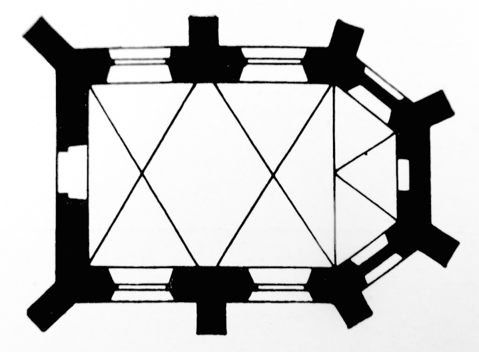 Grundriss der Kluskapelle in Borchen-Etteln